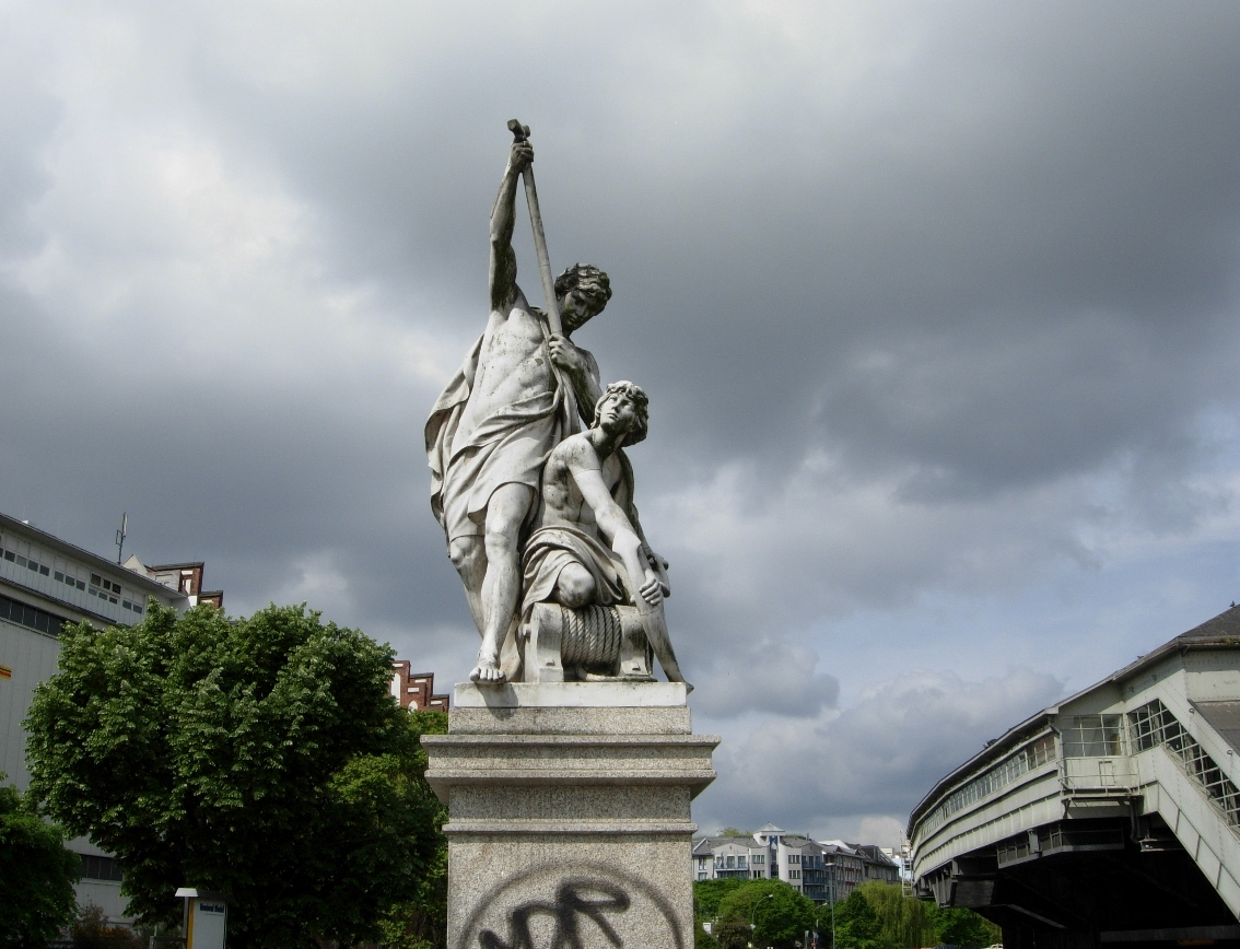 Berlin-Kreuzberg: Skulptur "Flußschiffahrt", 1879, von Otto Geyer (1843 - 1914) an der SW-Ecke der Brücke über den Landwehrkanal am Halleschen Tor. Ursprünglicher Standort: NO-Ecke der Brücke. Zeitweiliger Standort nach dem 2. Weltkrieg: Gelände des Urbankrankenhauses (Quelle: Deutsches Dokumentationszentrum für Kunstgeschichte – Bildarchiv Foto Marburg).